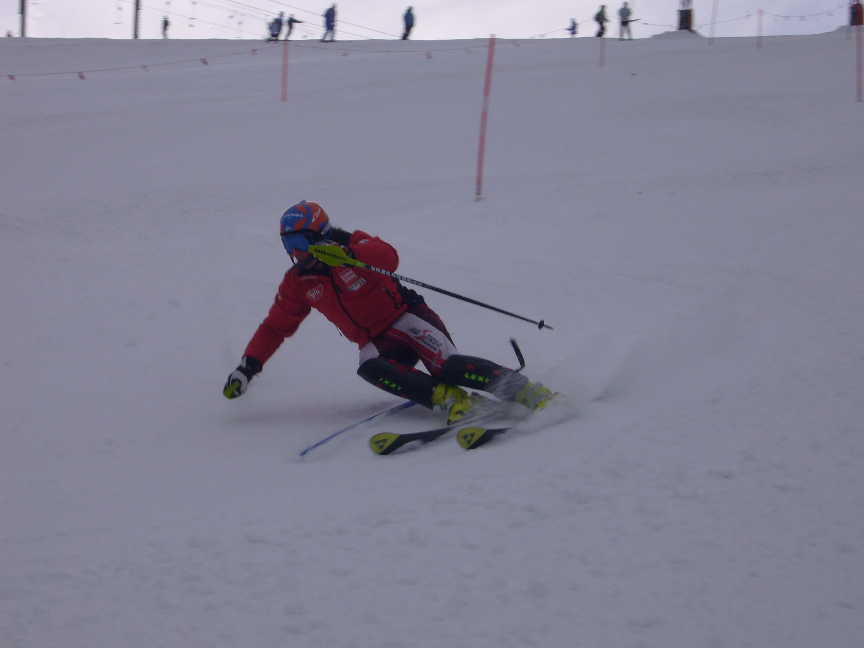 je to trenink na ledovci v zime v rakousku,autorem jsem ja !!!